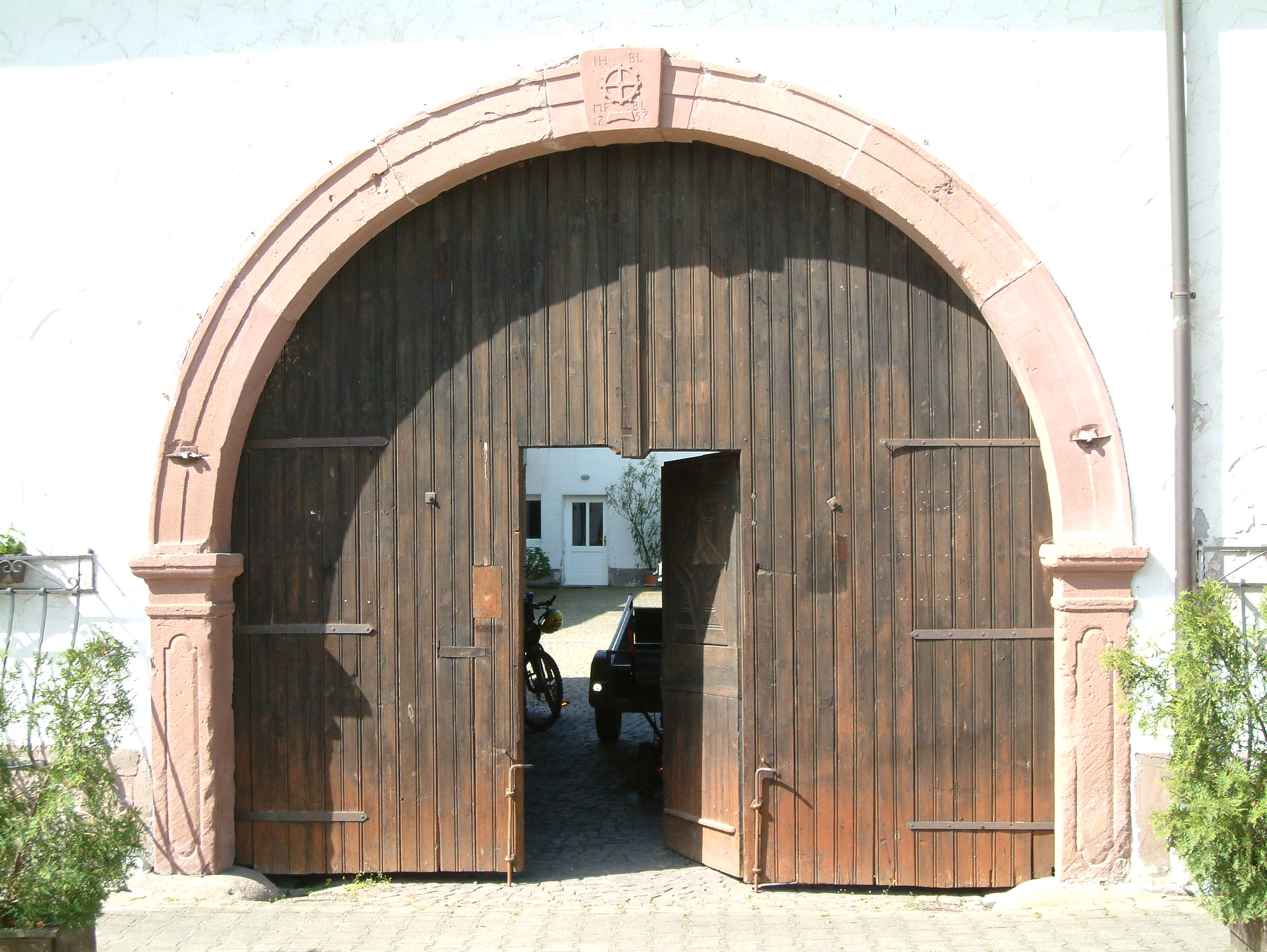 Spormühle (Torbogen von 1757) zu Dirmstein, selbst fotografiert am 28.04.2006 und freigegeben durch Benutzer:Mundartpoet